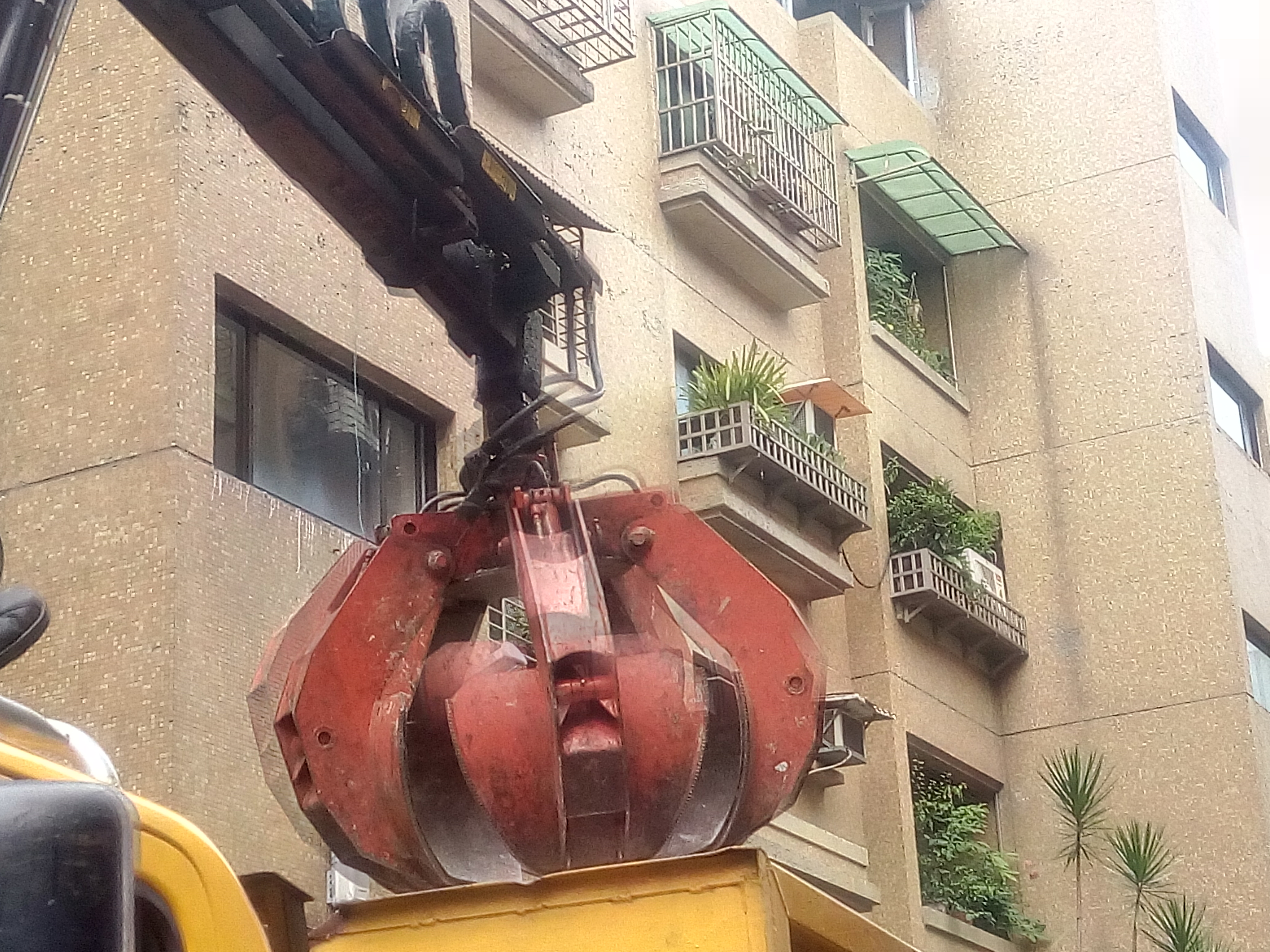 中文（台灣）: 新北市政府環境保護局抓斗車車爪